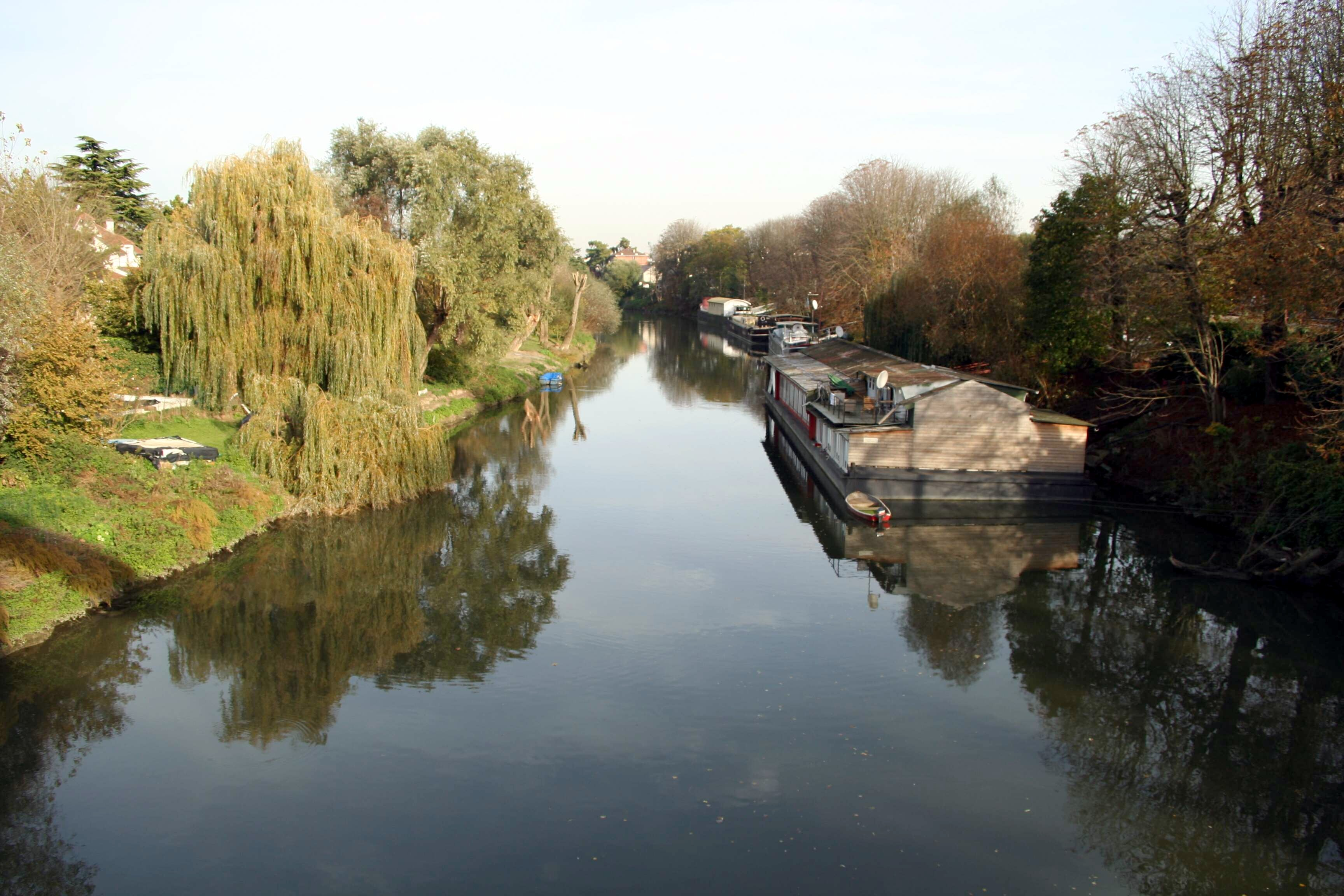 La Seine, bras de l'île de Migneaux à Poissy - Yvelines (France)